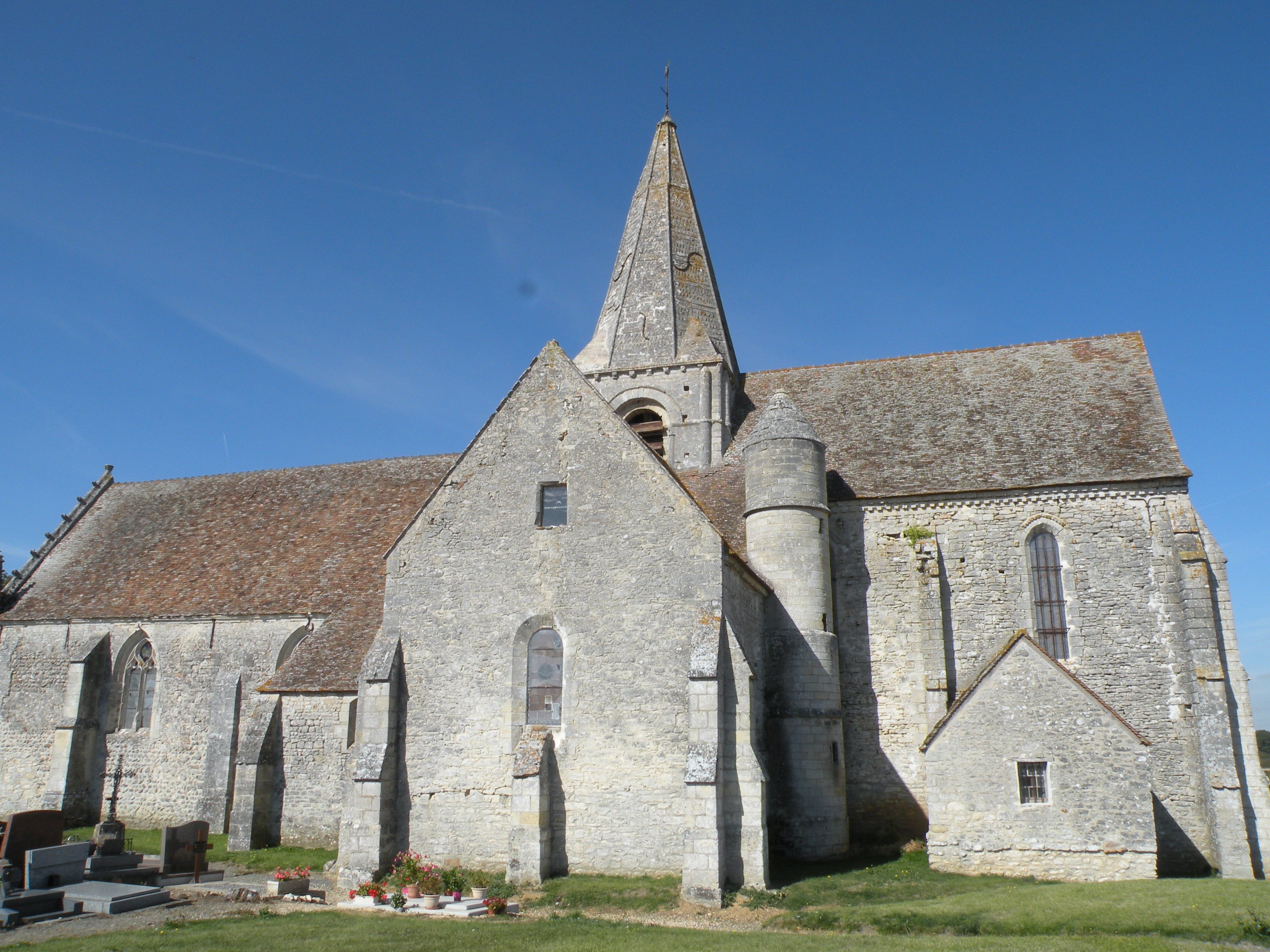 Église Saint-Gilles-Saint-Leu de Boubiers